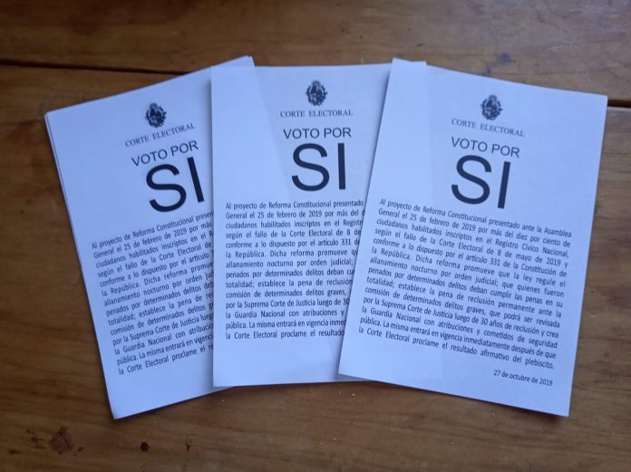 Bulletins de vote utilisés pour le référendum de 2019 en Uruguay